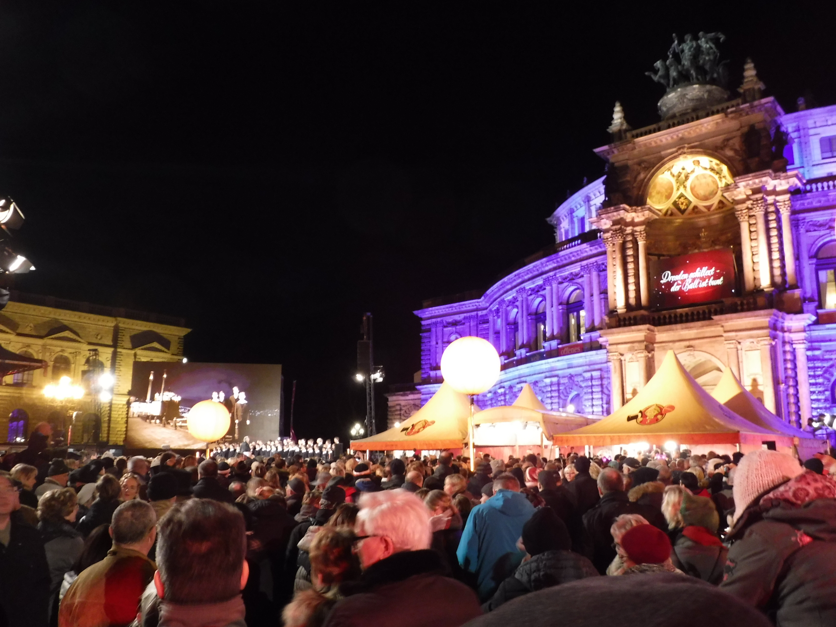 SemperOpenairball vor der Semperoper mit Übertragung des SemperOpernballs